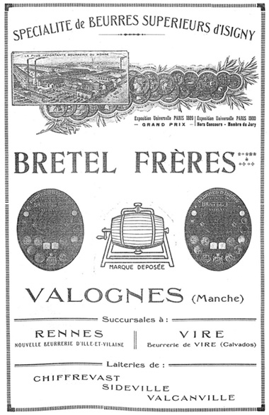 Publicité pour les beurres Bretel Frères (Valognes, France), dans